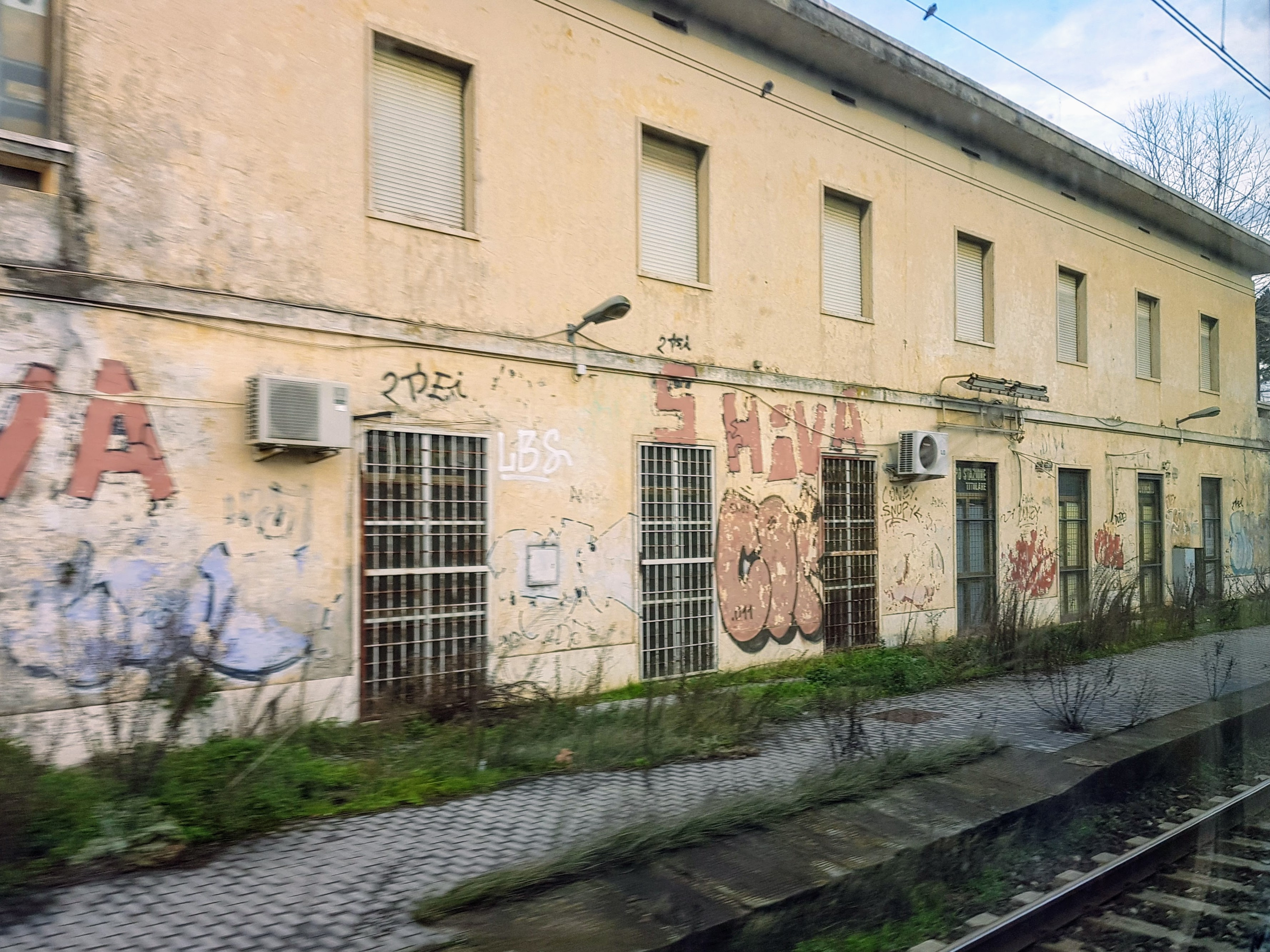 Stazione dismessa di Viareggio Scalo. Foto da un treno in transito.